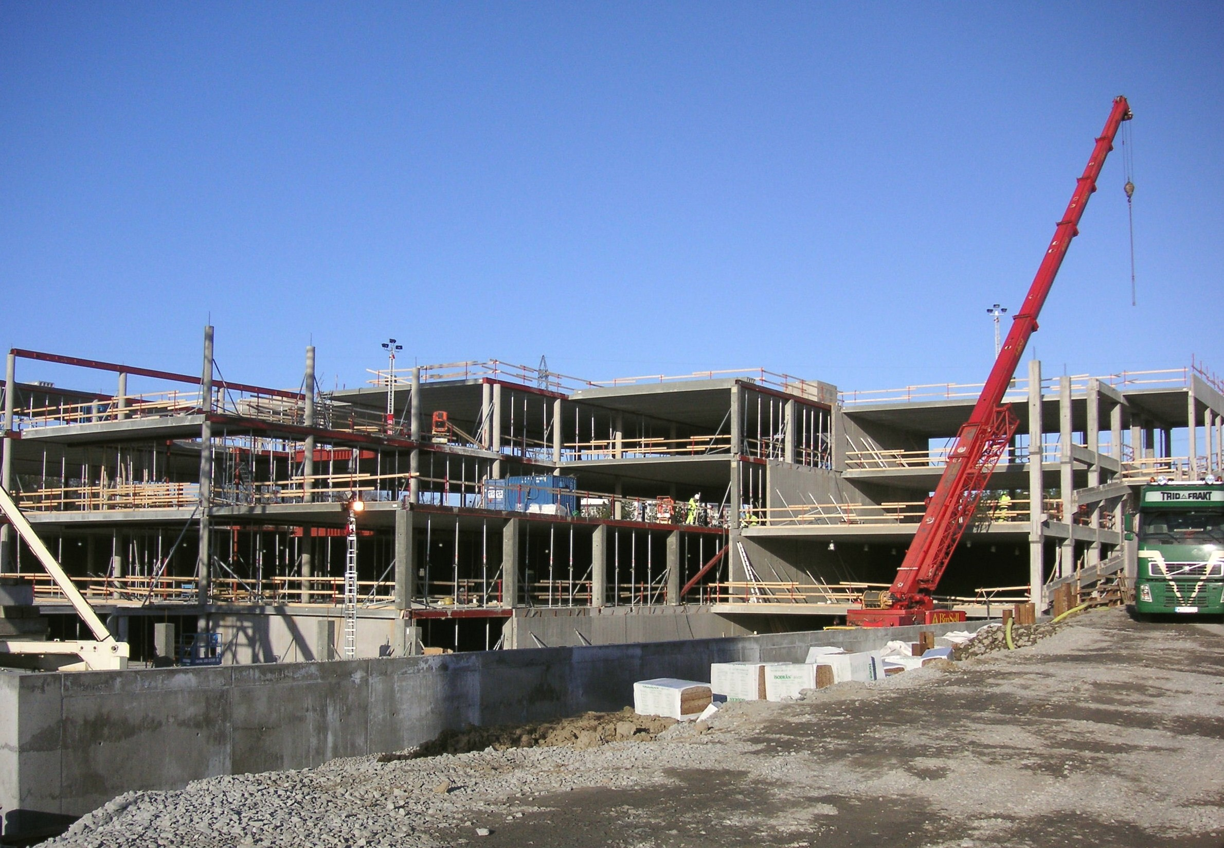 Exempel för ett stommontage av en betongstomme för "BOX-huset" Kungens kurva.